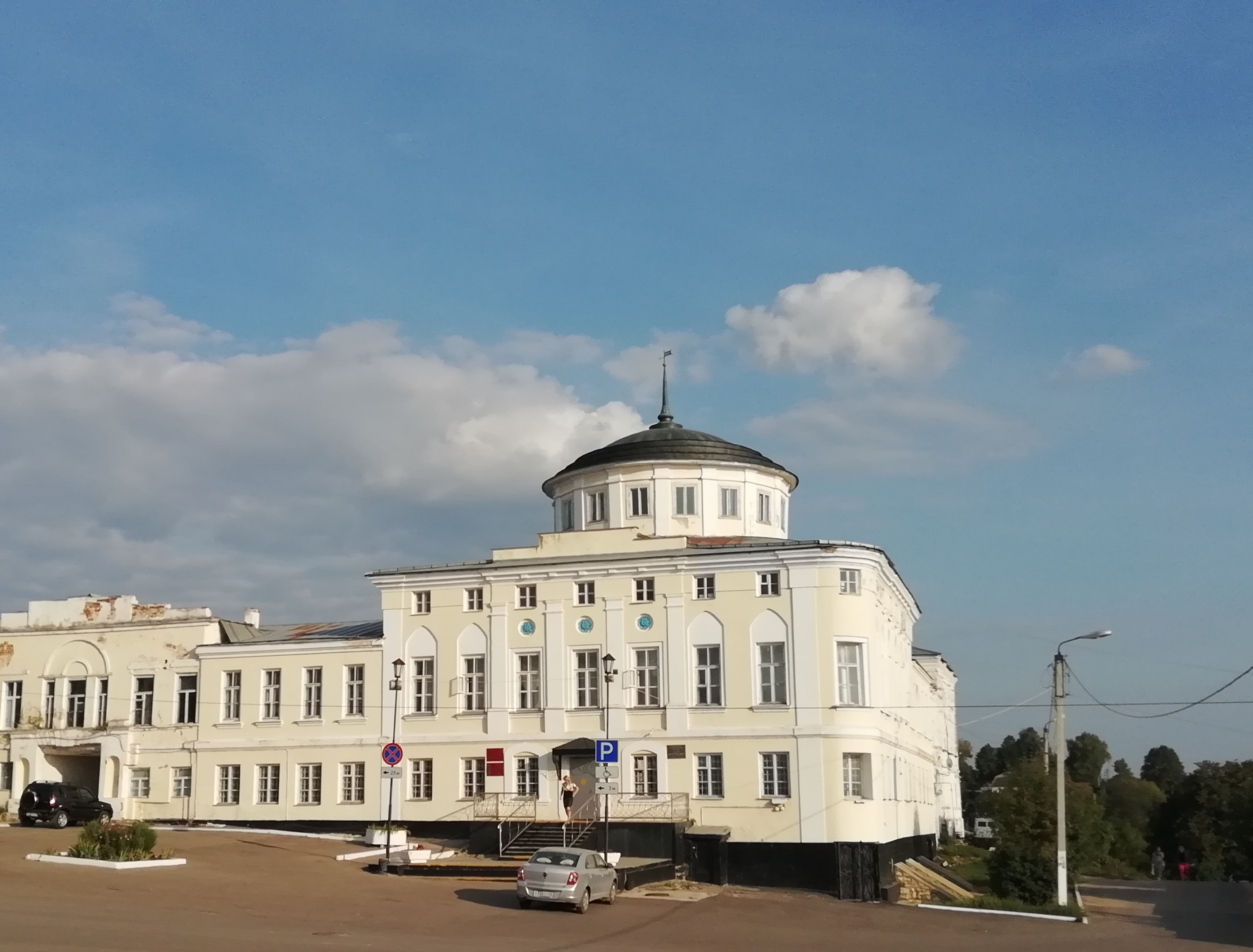 Здание дома Алянчикова, памятник архитектуры регионального значения